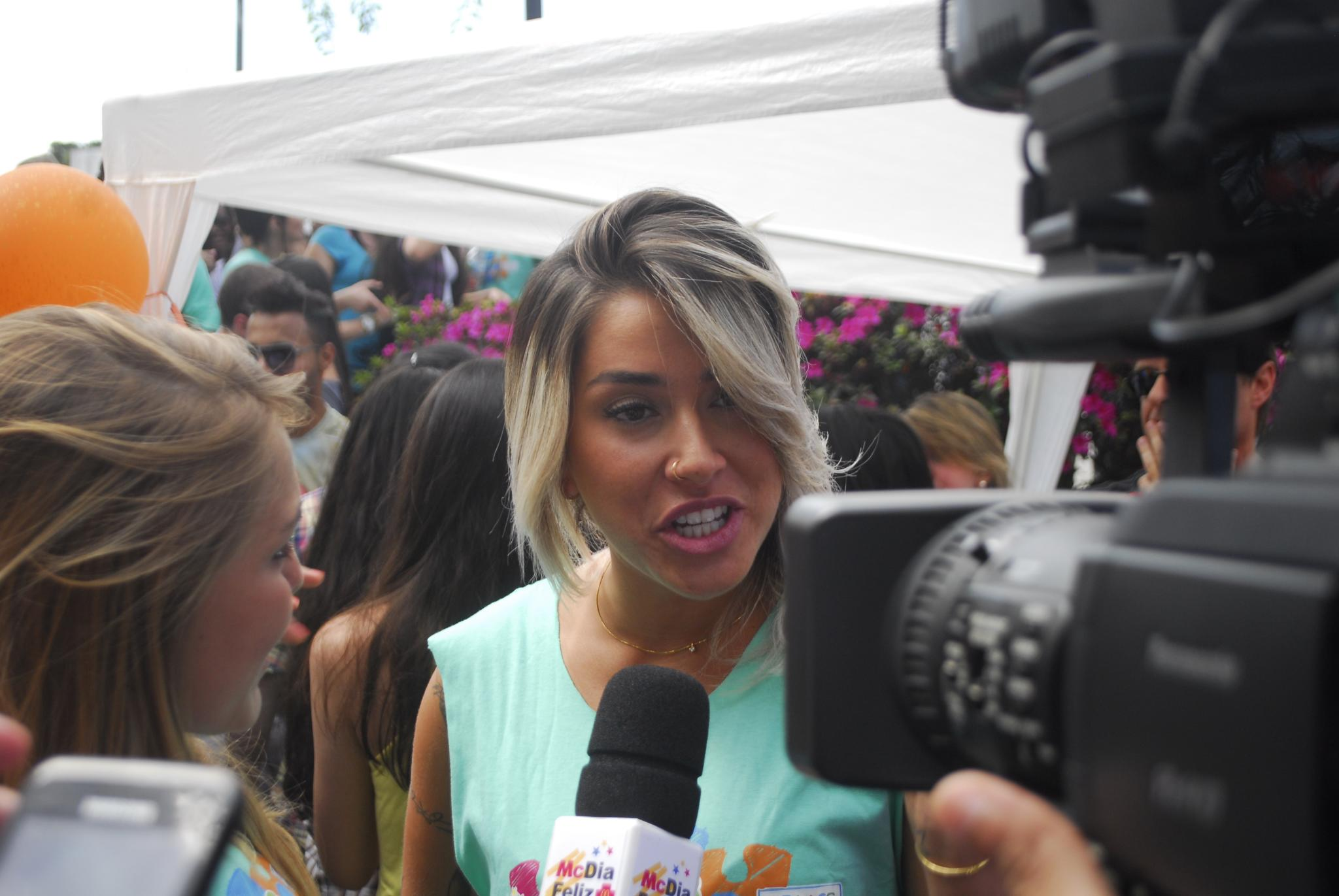 Dani Bolina no McDia Feliz de 2012.